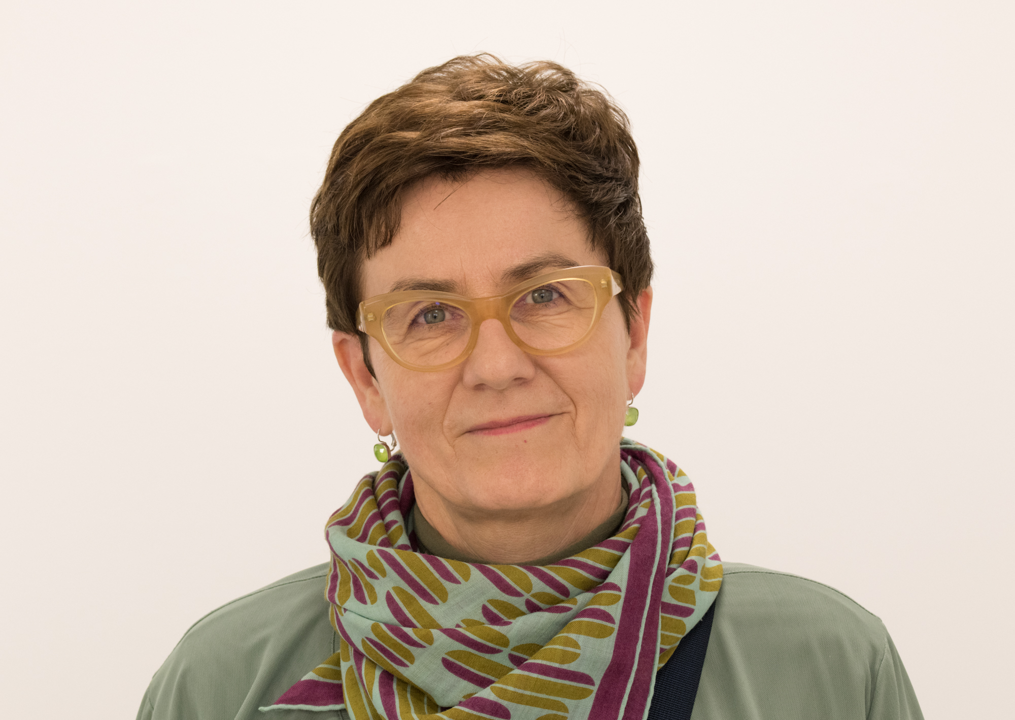 Priska Riedl in der Galerie 422 in Gmunden